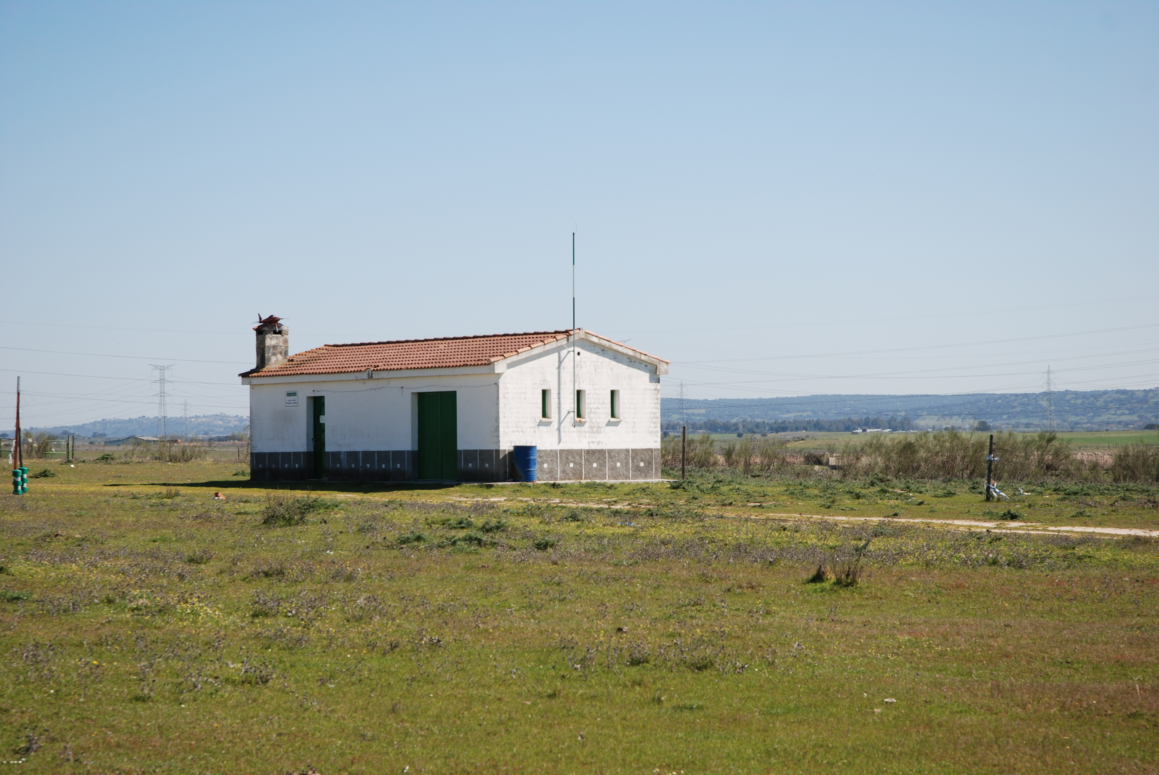 Albergue ganadero de la Cañada Real (Saucedilla, Cáceres)